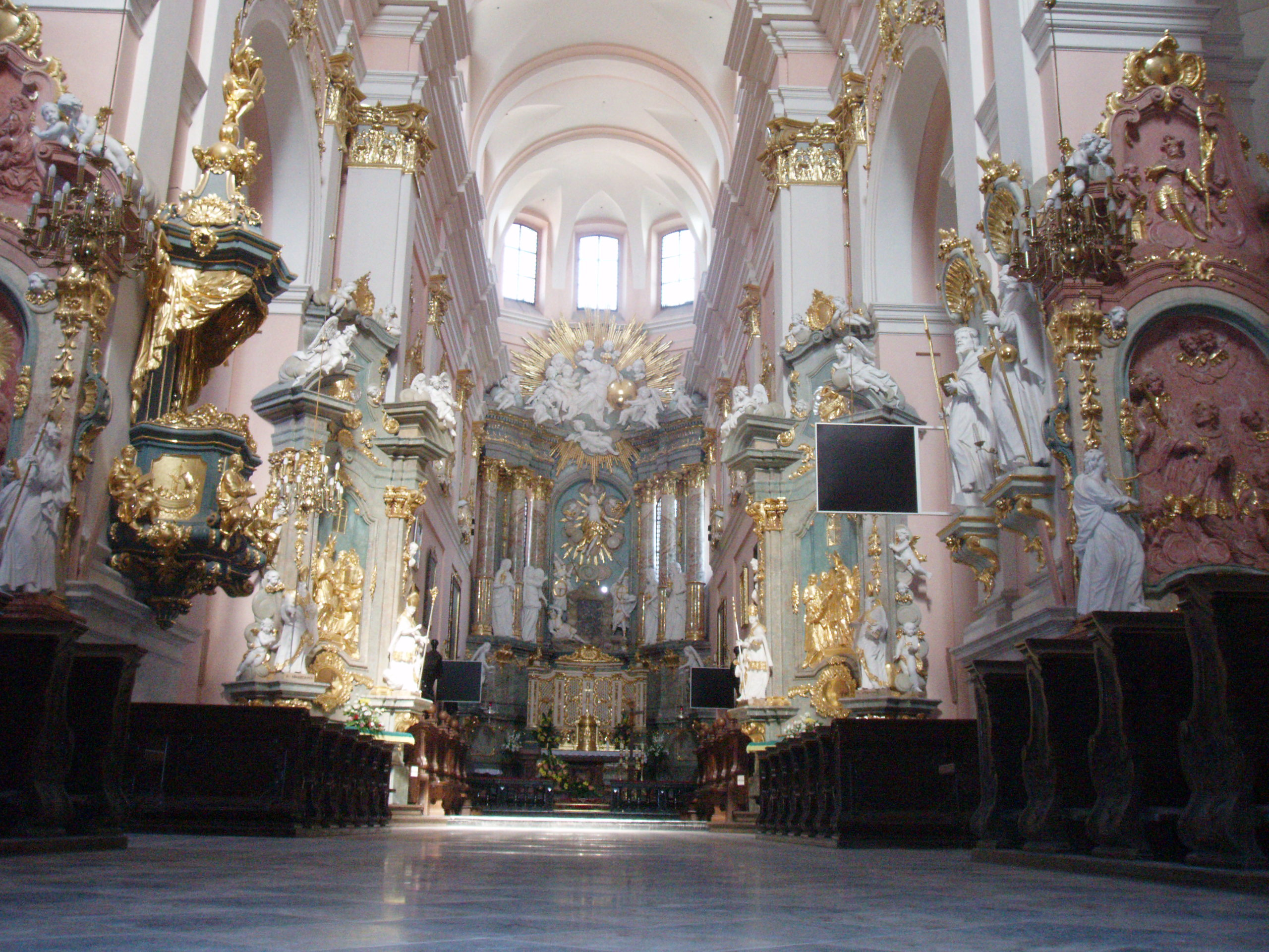 Miechów, kościół, ob. parafialny pw. Grobu Pańskiego, XIII/XIV, XVIII